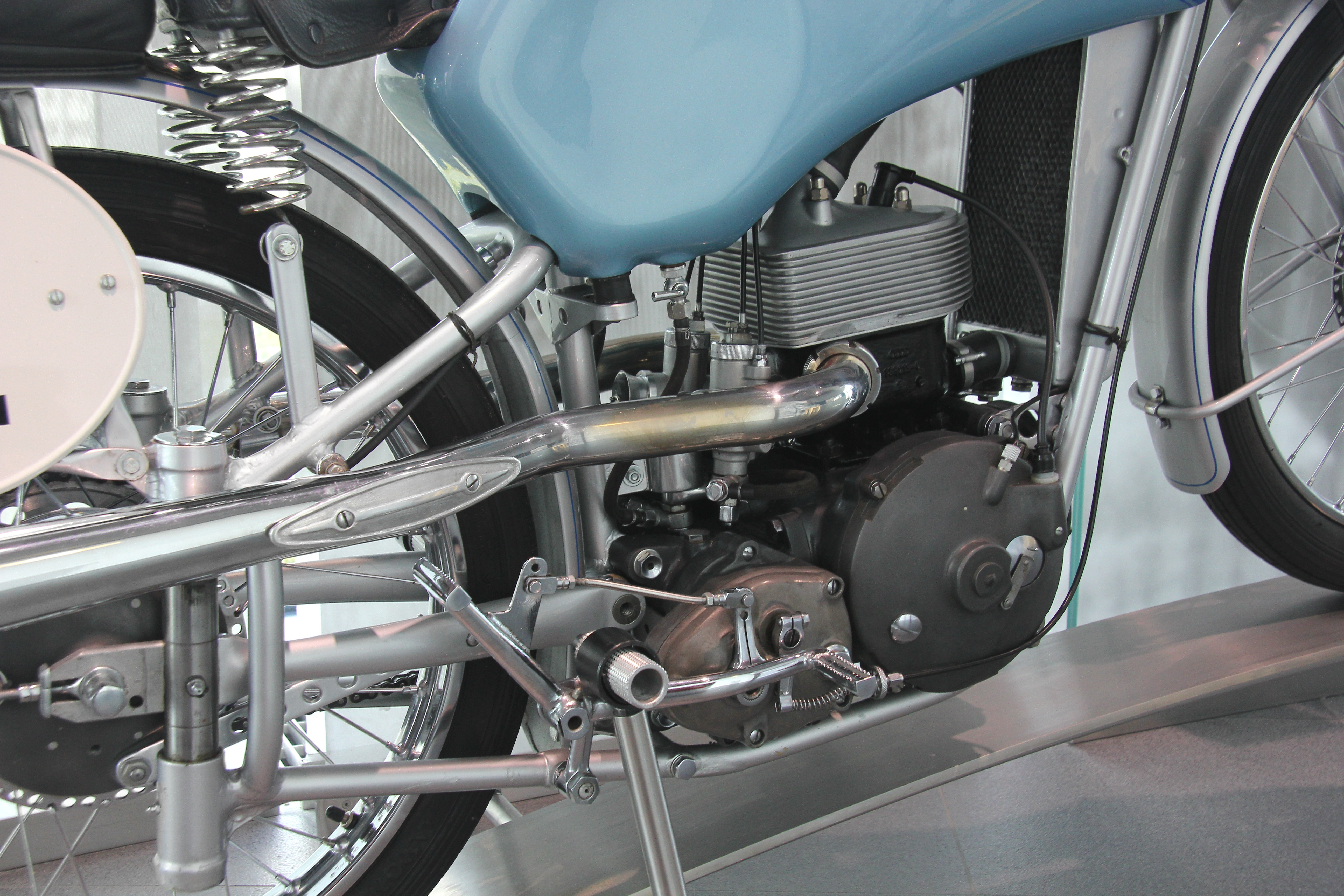 DKW SS 250 im museum mobile in Ingolstadt. Zweitakt-Doppelkolbenmotor mit Ladepumpe